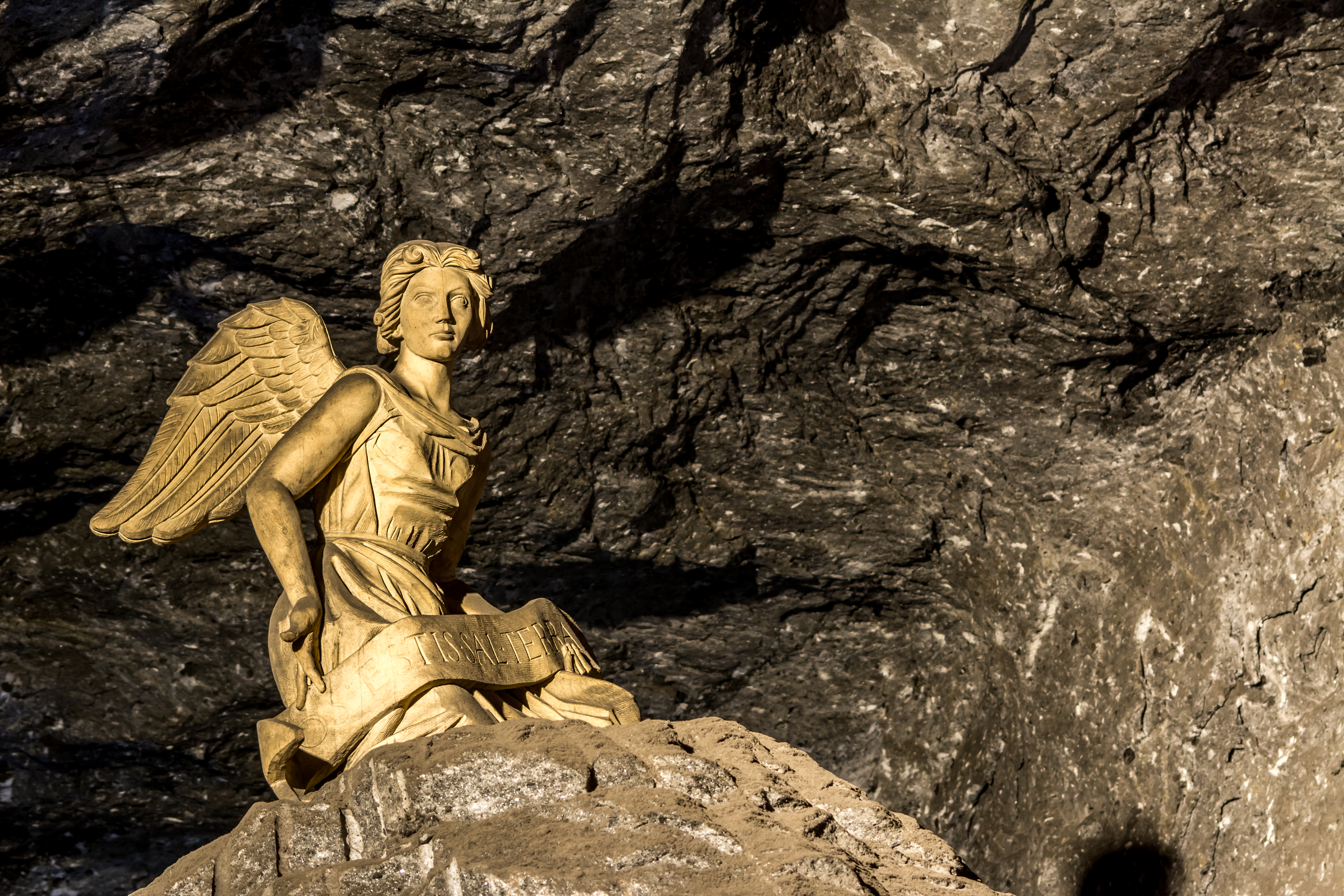 Mina de sal , Zipaquira Colombia Esta fotografía fue tomada en el municipio colombiano con código 25899.